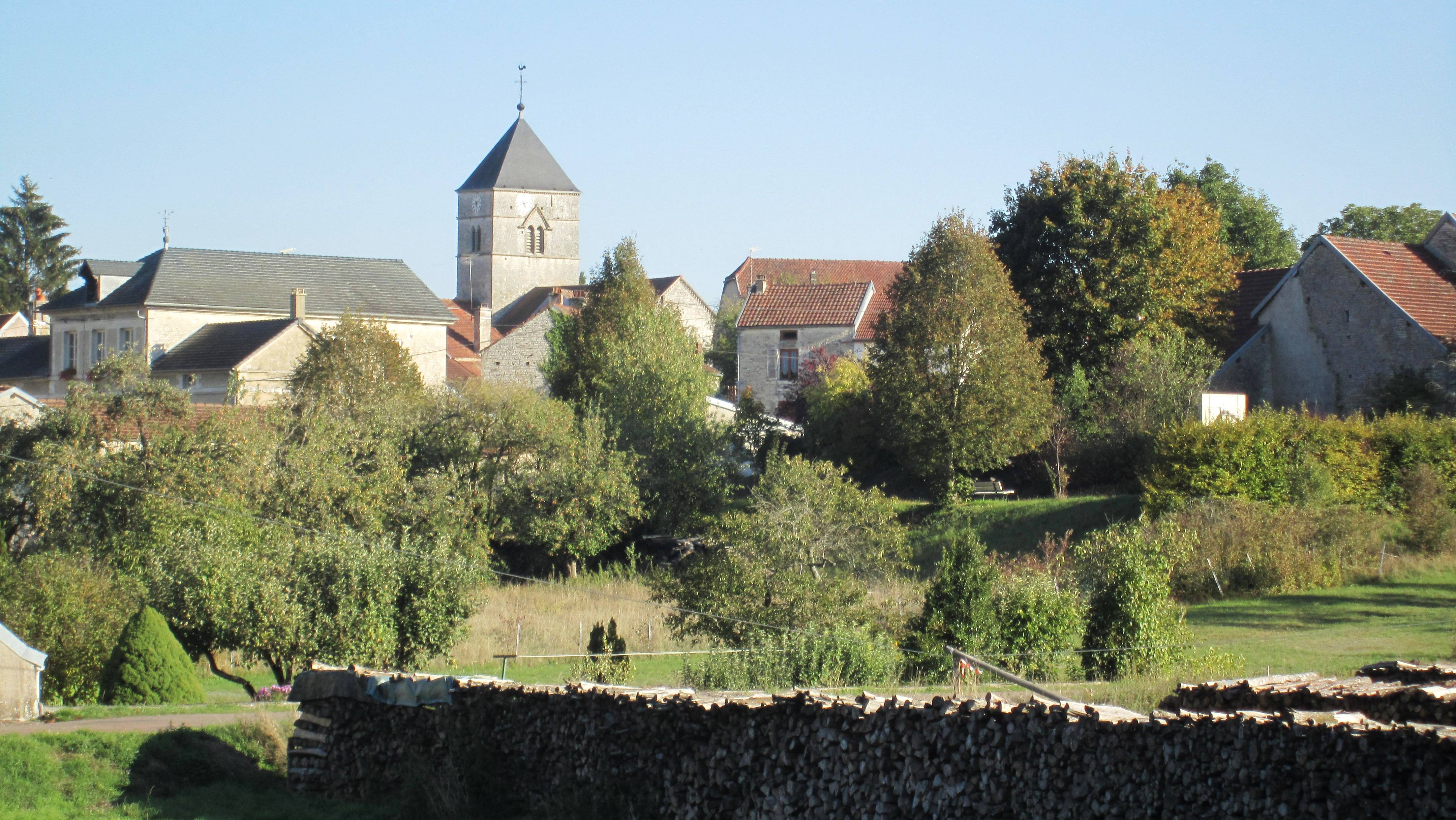 La Chaume (Côte-d'Or)